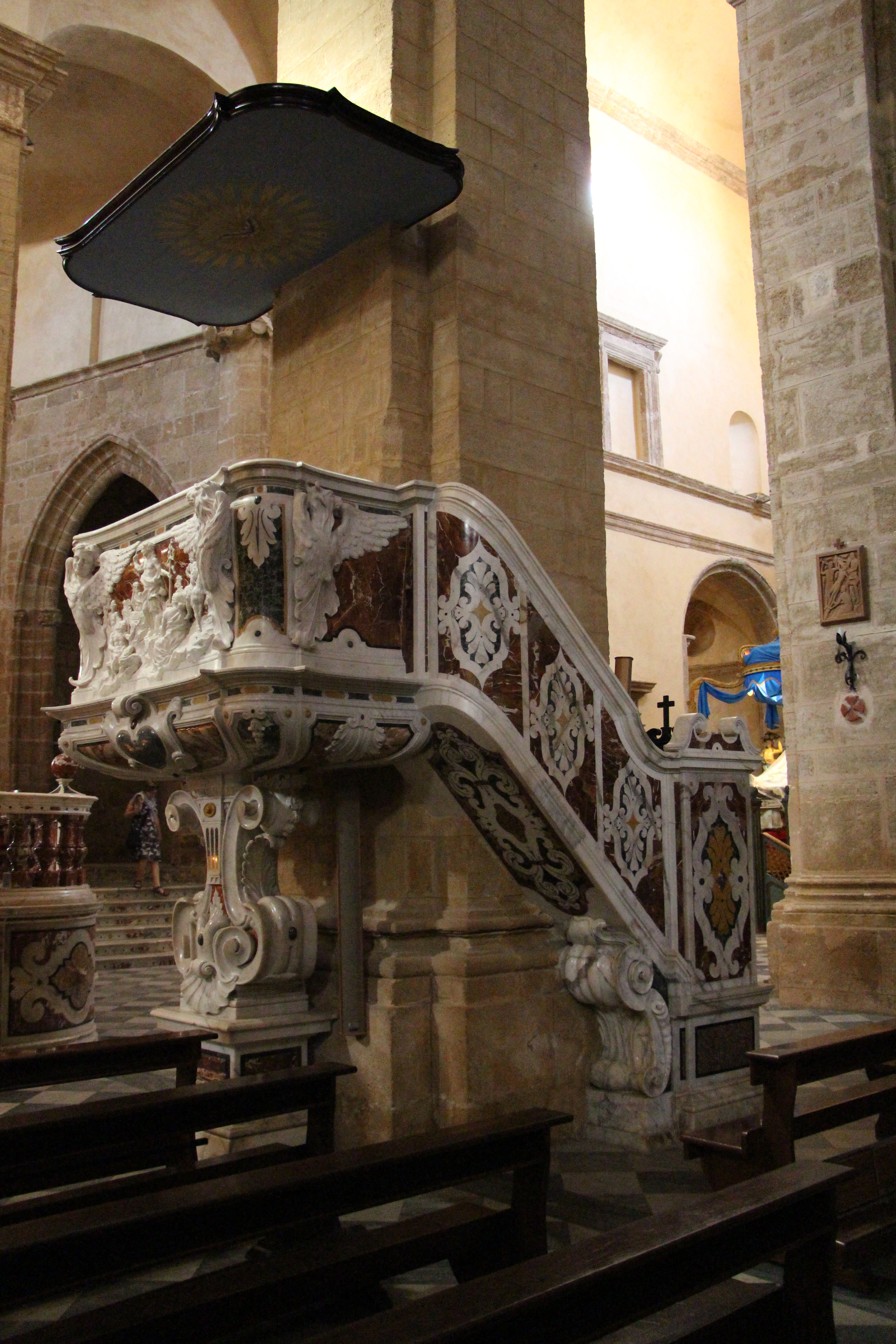 chiese di Alghero, Italia